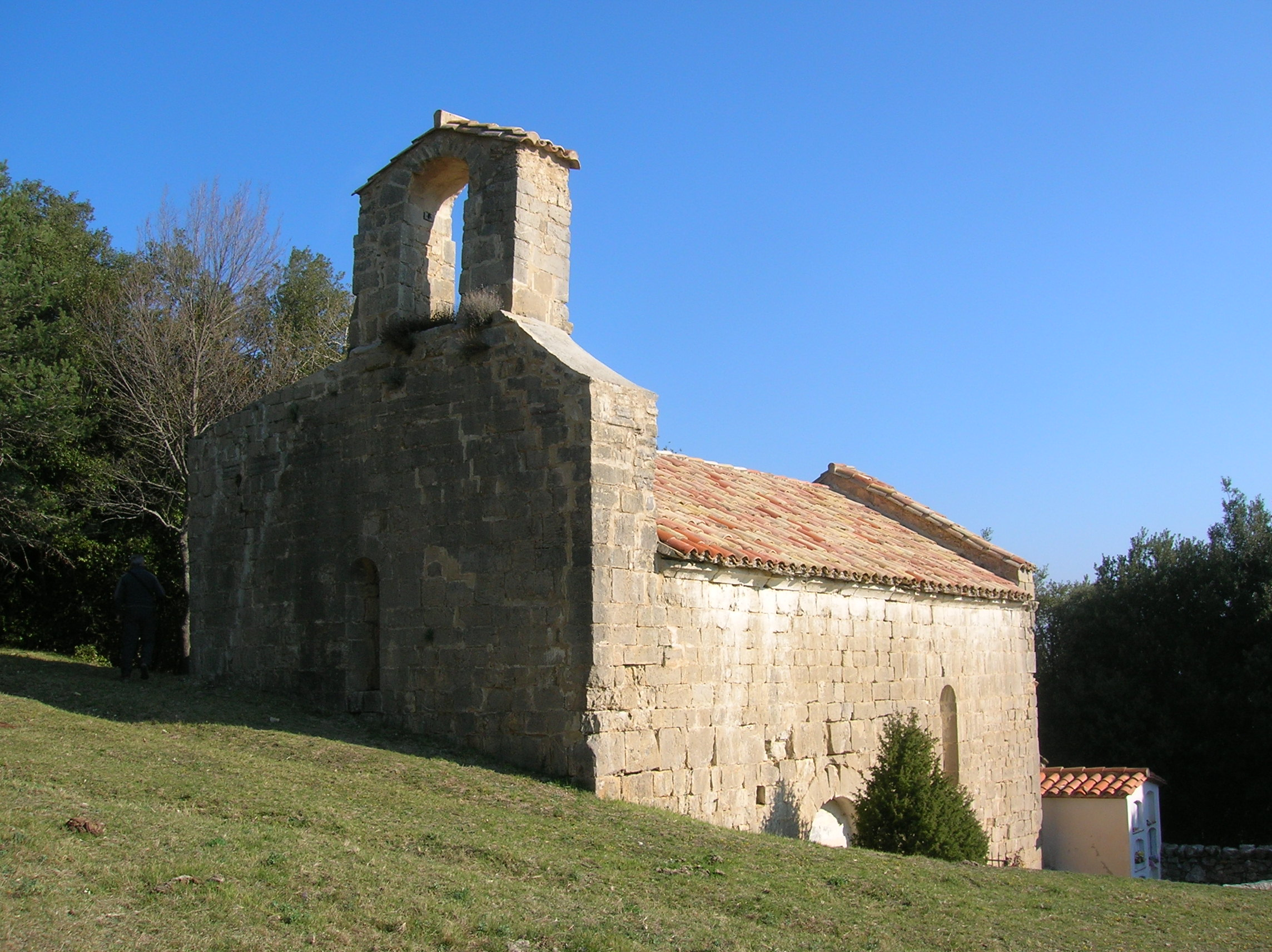 Sant Miquel de Monteia